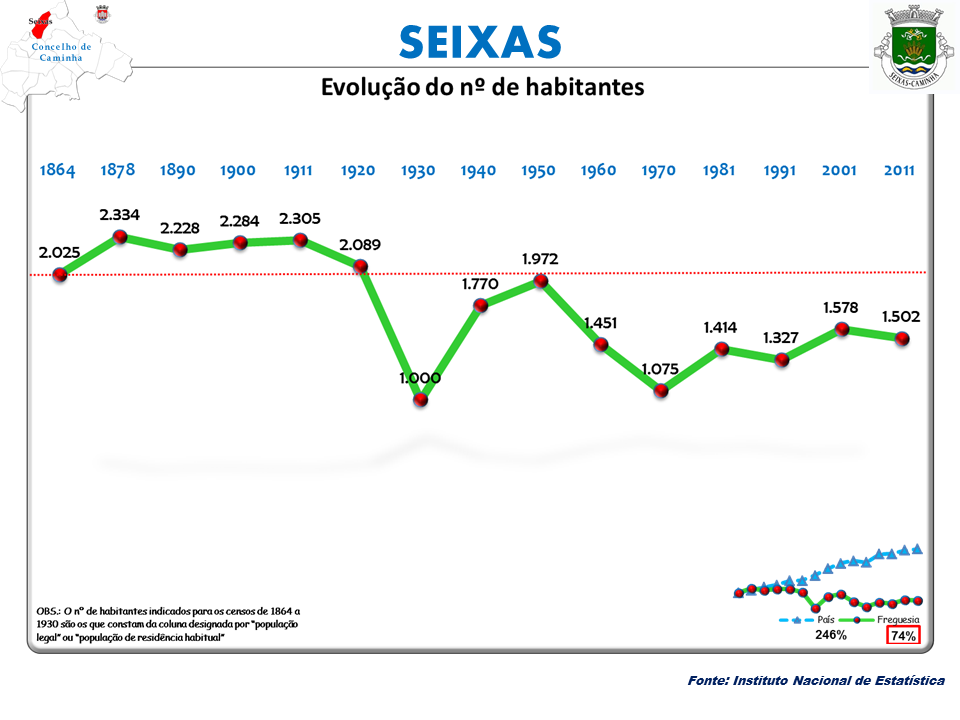 Censos 1864/2011